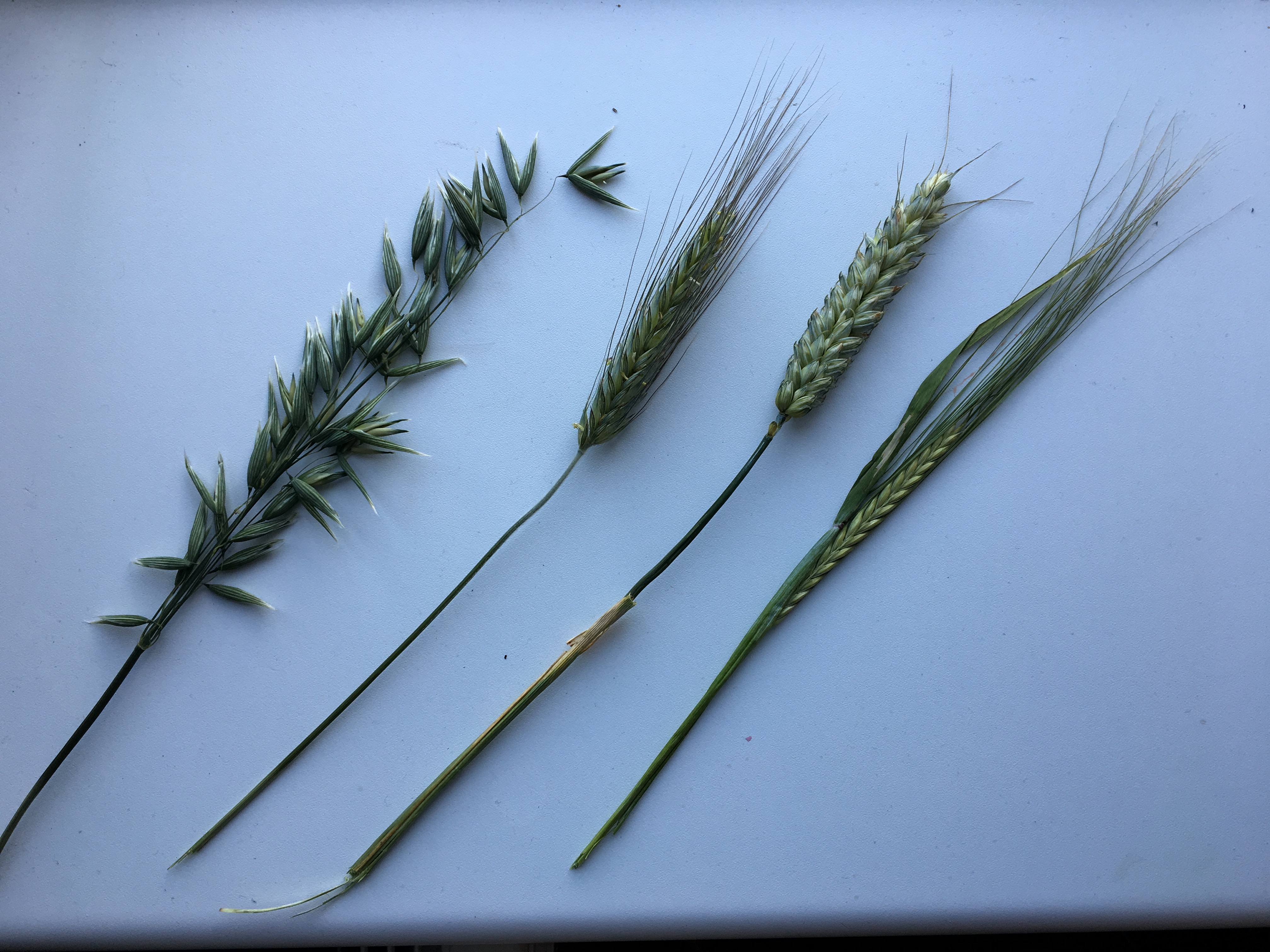 Kornsorters aks fotograferet midt i vækstsæsonen.